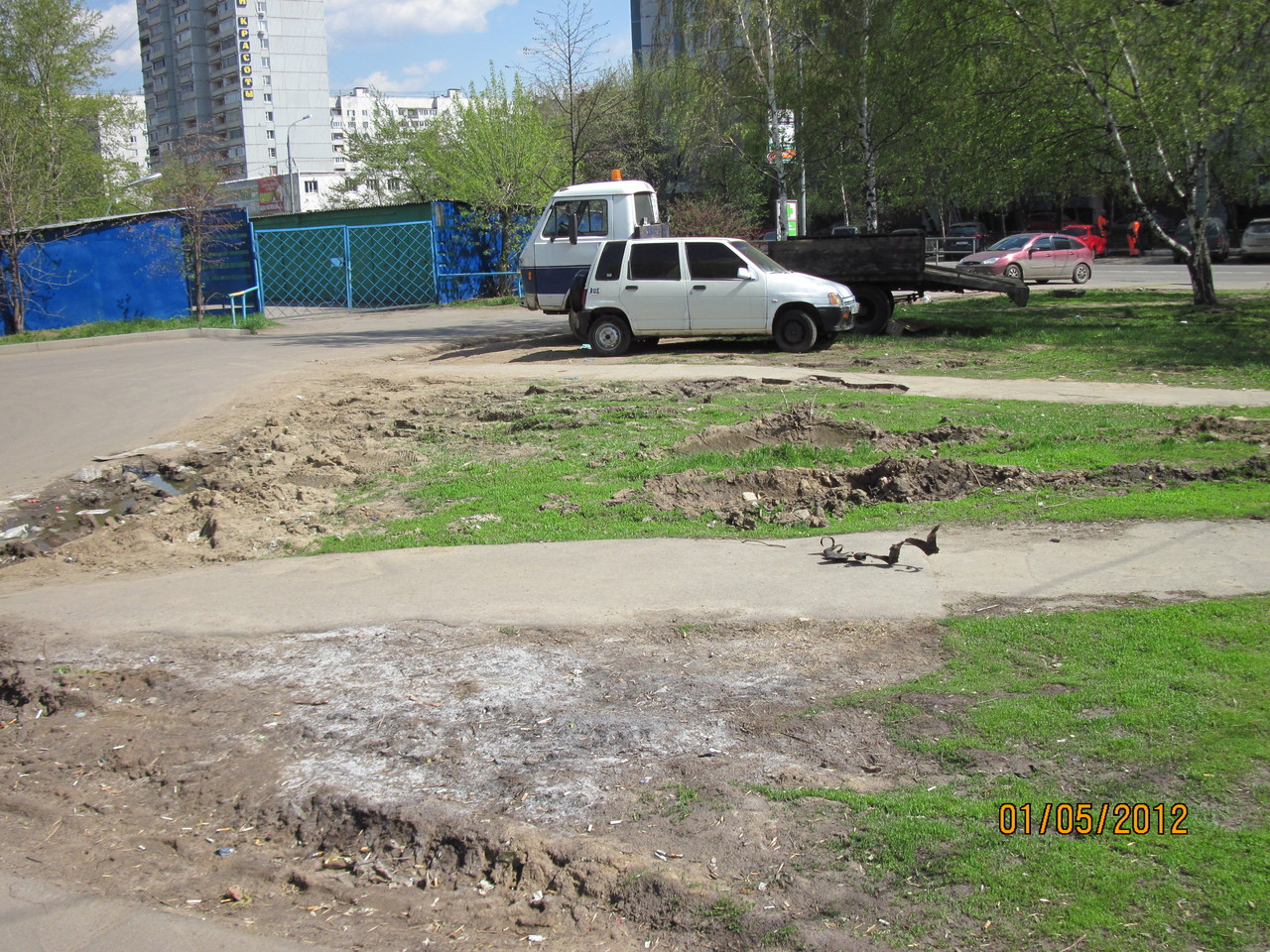 Пример разрушения газона в Москве, ул. Плещеева, 2012